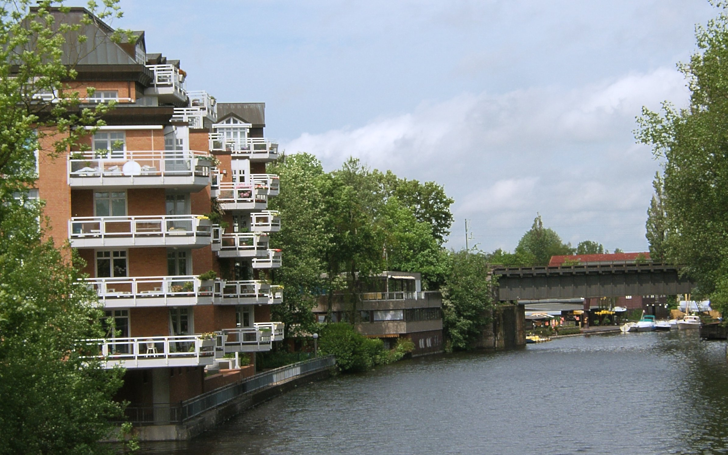 Alsteroberlauf in Alsterdorf mit Brücke der Güterumgehungsbahn